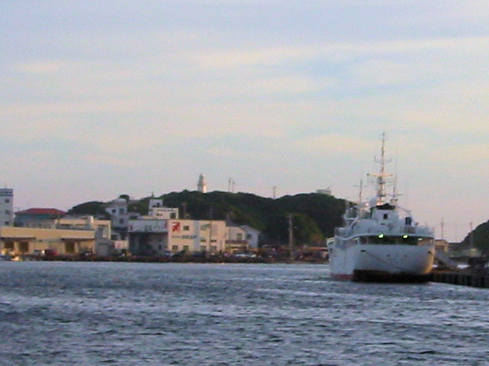 Misaki harbour, Kanagawa, Japan.